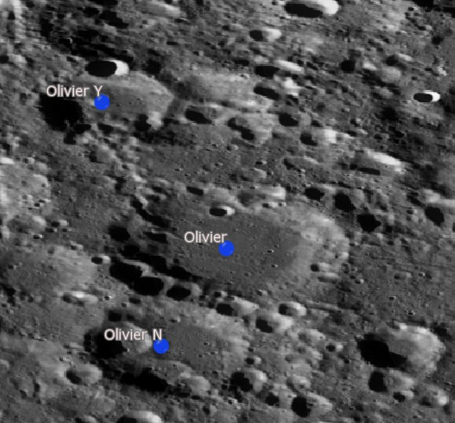 Cráter lunar Olivier. Cráteres satélite. (Imagen LRO)